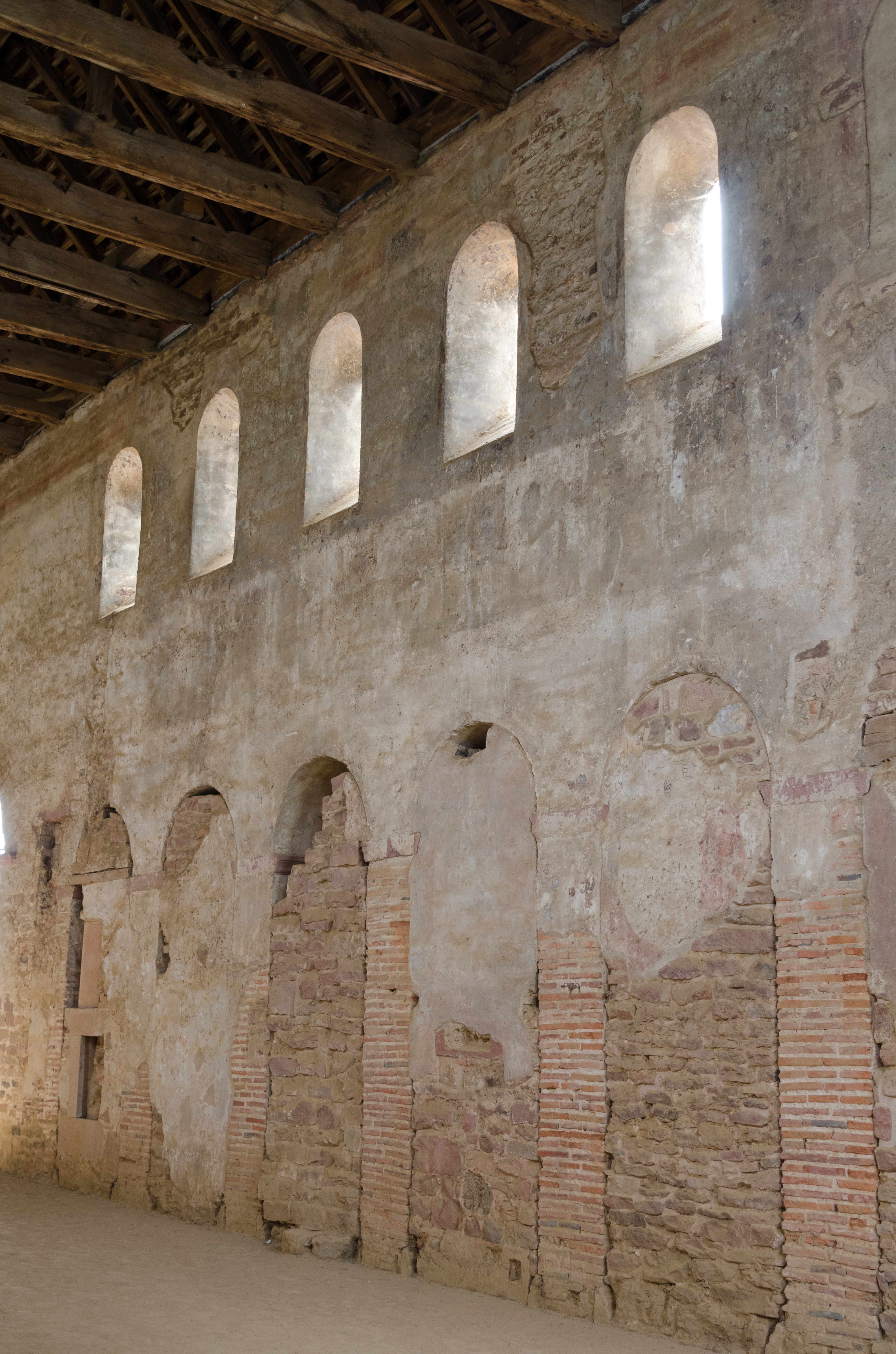 Michelstadt, Steinbach, Einhardsbasilika